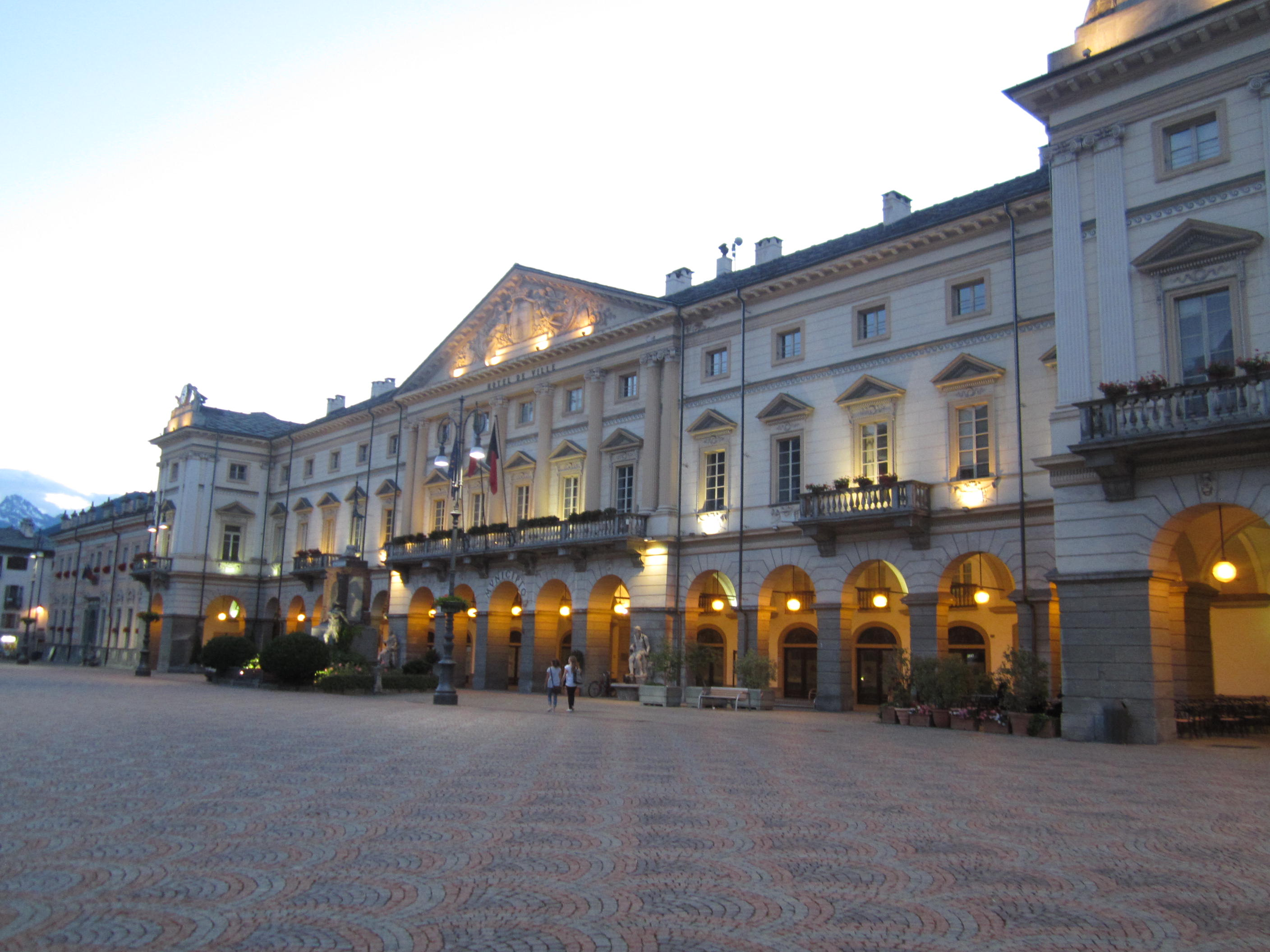 Place Emile Chanoux ad Aosta